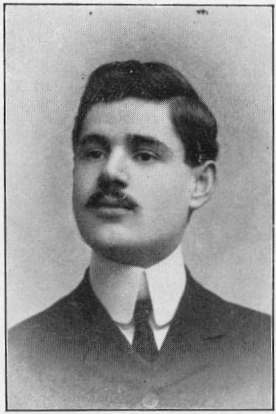 D-ro Rafaele Bagnulo L. K., Naplo, redaktoro de "Gefrataro Esp-a".